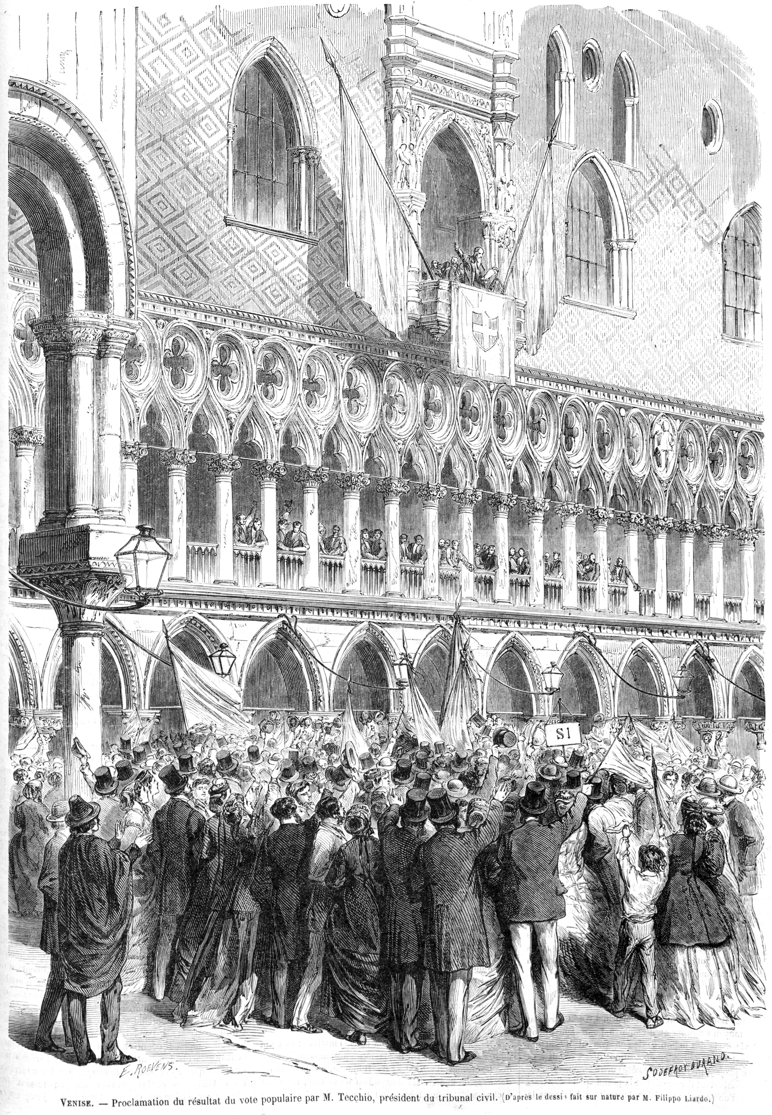 Sebastiano Tecchio, presidente del Tribunale d'Appello, annuncia i risultati del plebiscito dal balcone di Palazzo Ducale